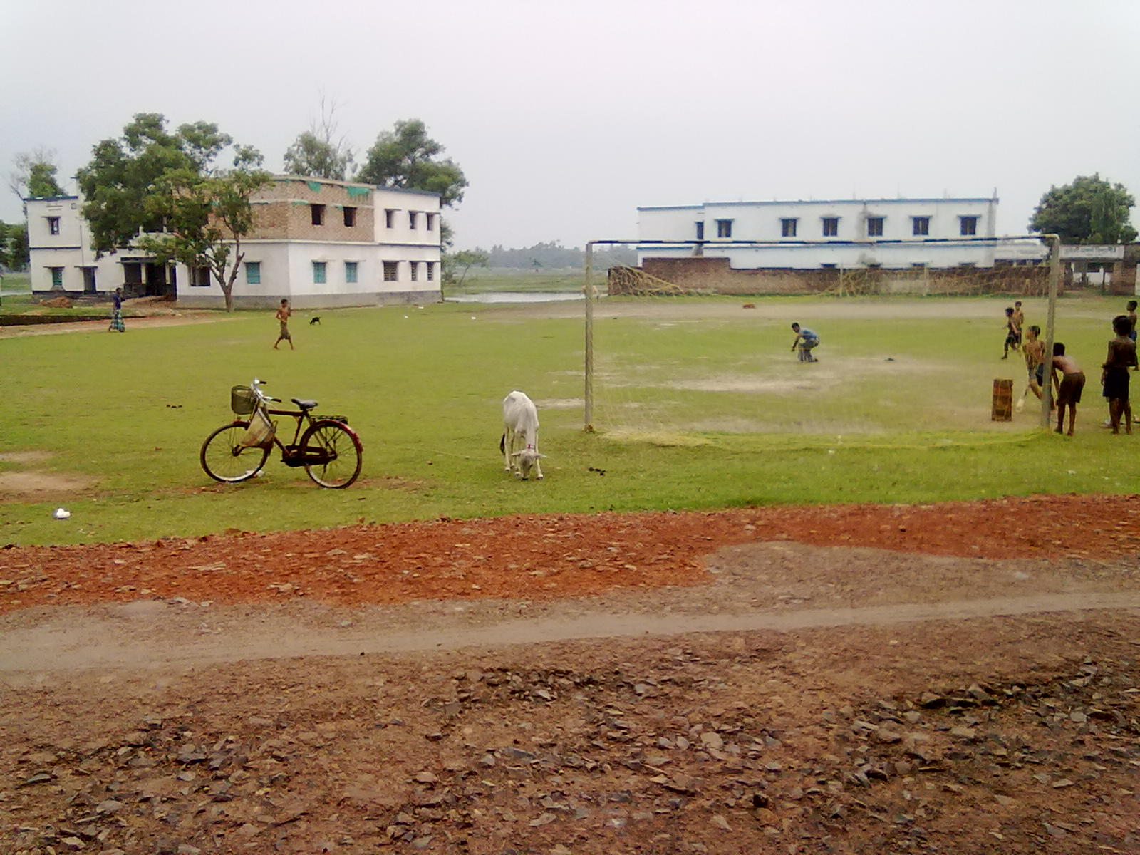 Jhuruli Ball field